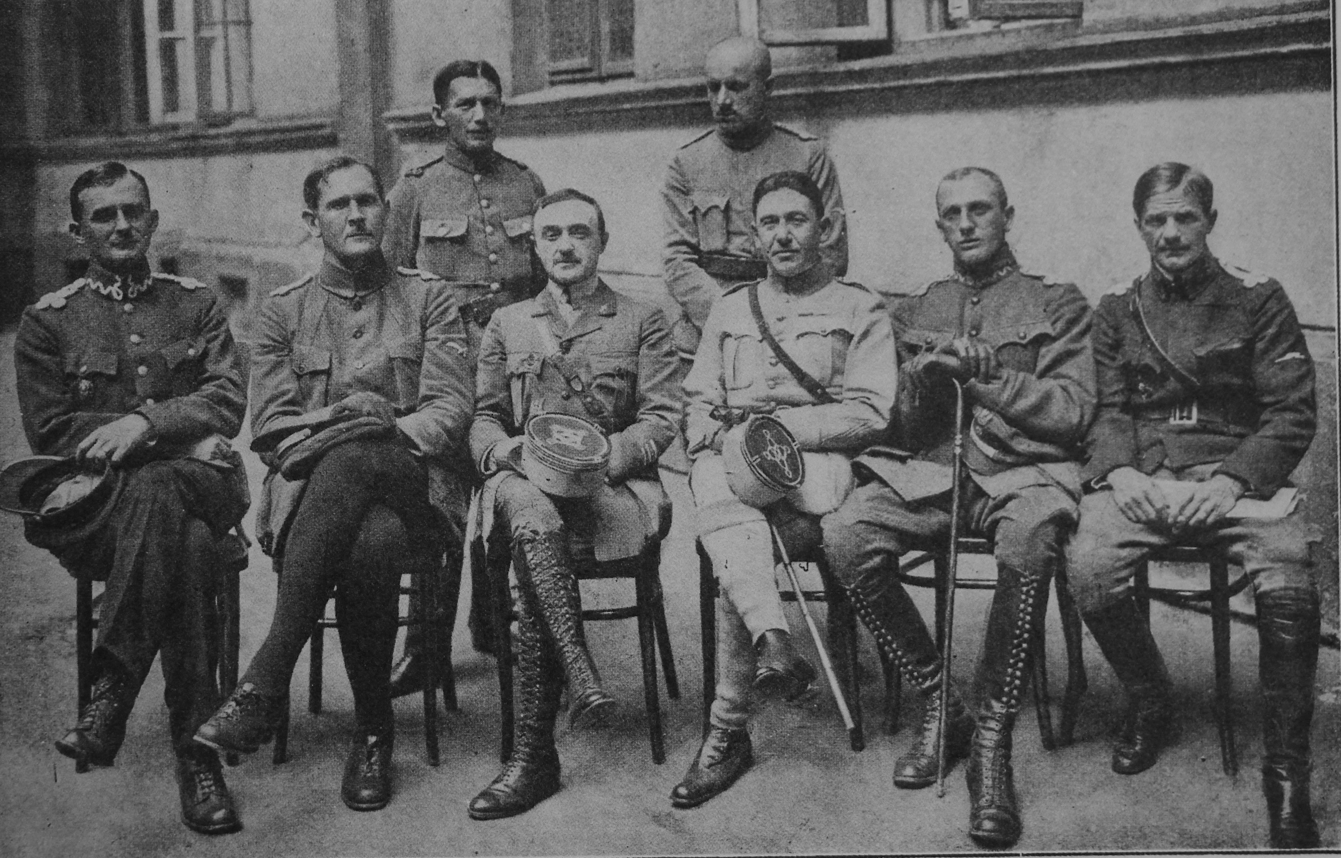 Zjazd dowódców grup lotniczych na konferencji u Szefa Lotnictwa Nacz. Dow. Siedzą: mjr Aleksander Serednicki, kpt. Juljan Słoniewski, ppłk Francois de Vergnette, kpt. Enclancher, por. Jerzy Borejsza, kpt. Camillo Perini. Stoją: kpt. Adam Tieger, por. Stefan Bastyr.